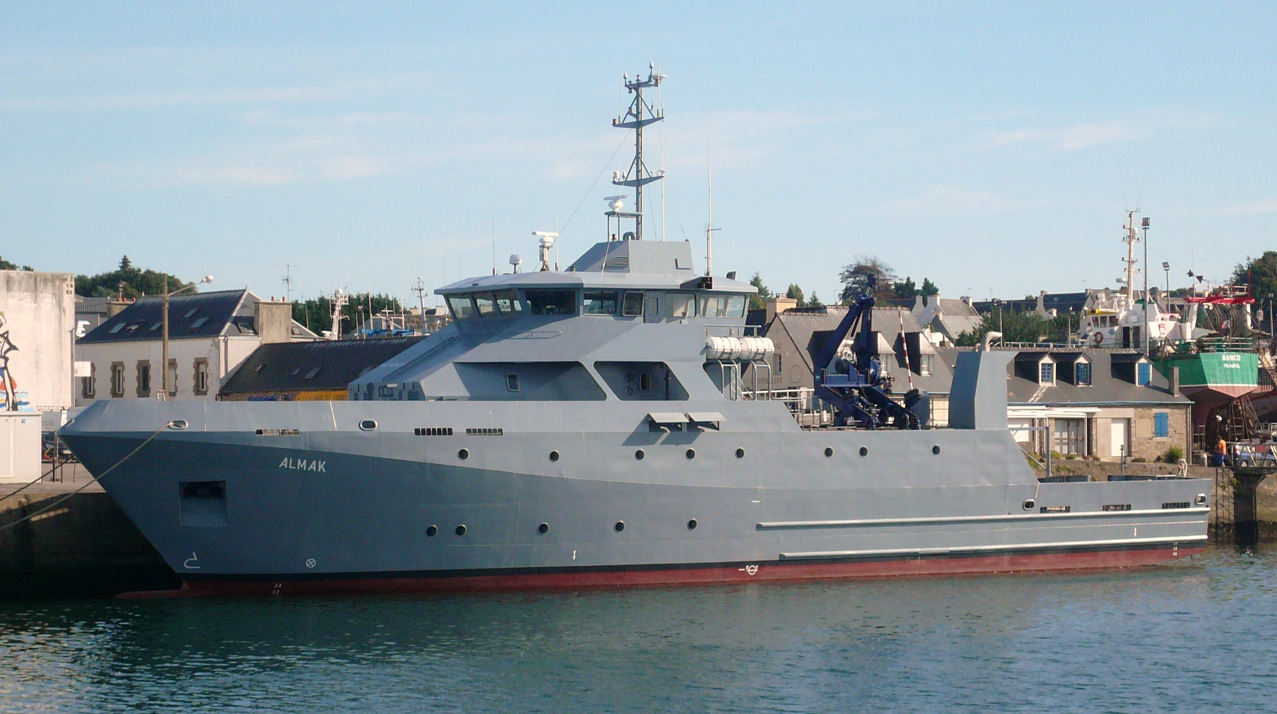 Le navire d'entraînement Almak à quai à Concarneau.